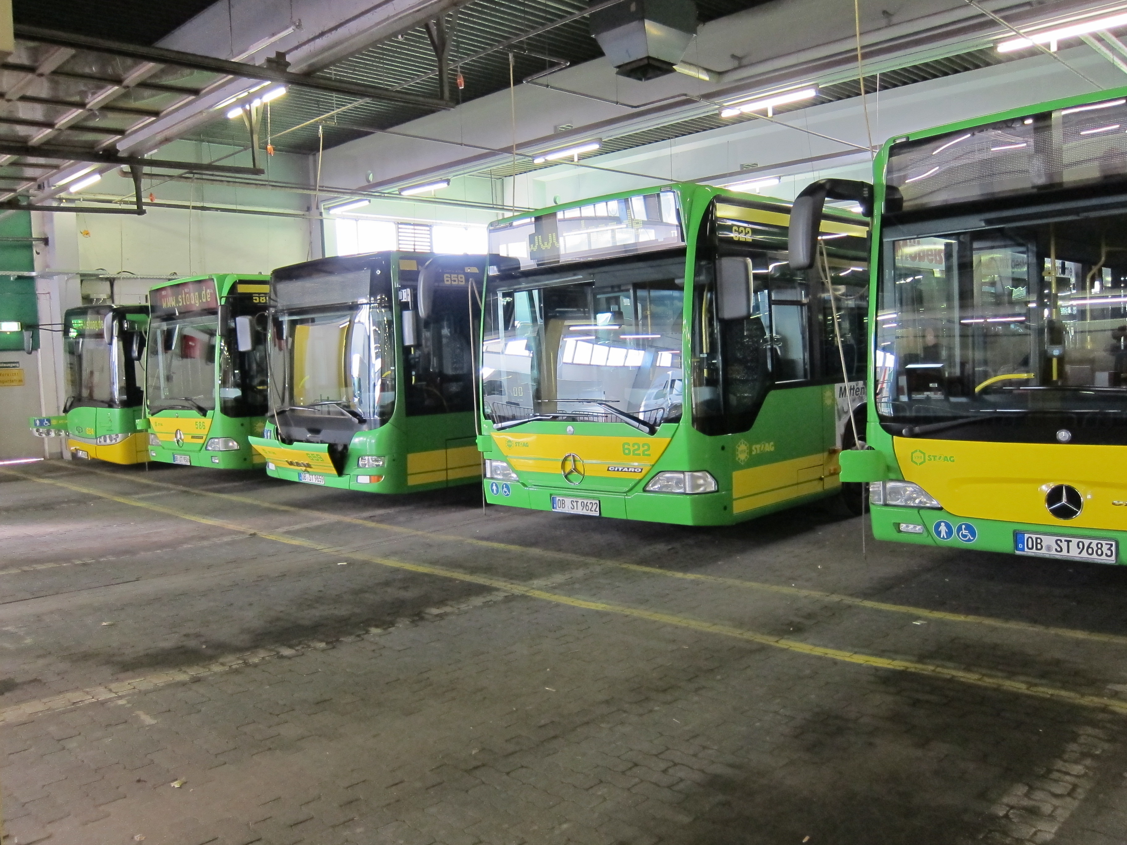 Busdepot der STOAG. Aufgenommen am Tag der offenen Tür 2012